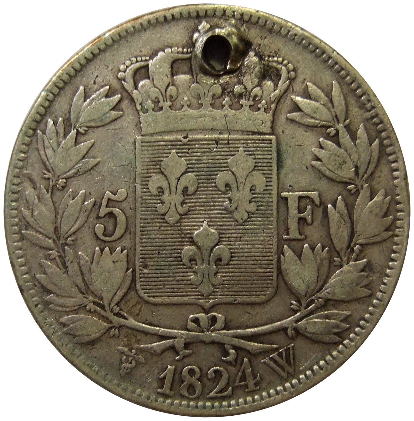 Revers d'une pièce de 5 francs émise sous Louis XVIII en 1824